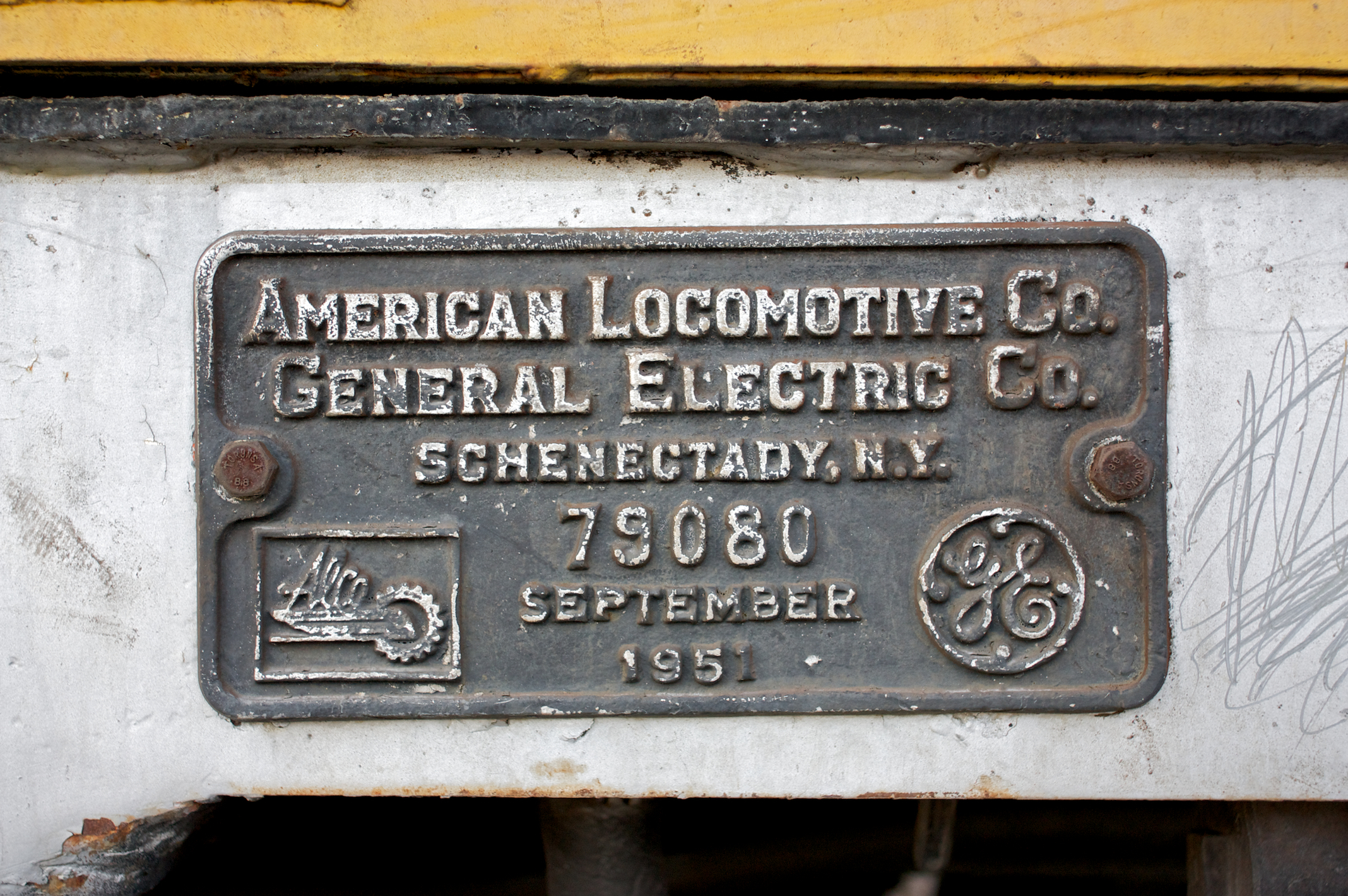 pormenor da placa do fabricante. Local: Estação de Alcácer do Sal [Linha do Sul, PK 78] Data e hora: 13 de Outubro de 2010 [18h59] Material: Locomotiva 1525 [Alco] N.º UIC: 90 94 200 0020-2 P (Somafel 1417)